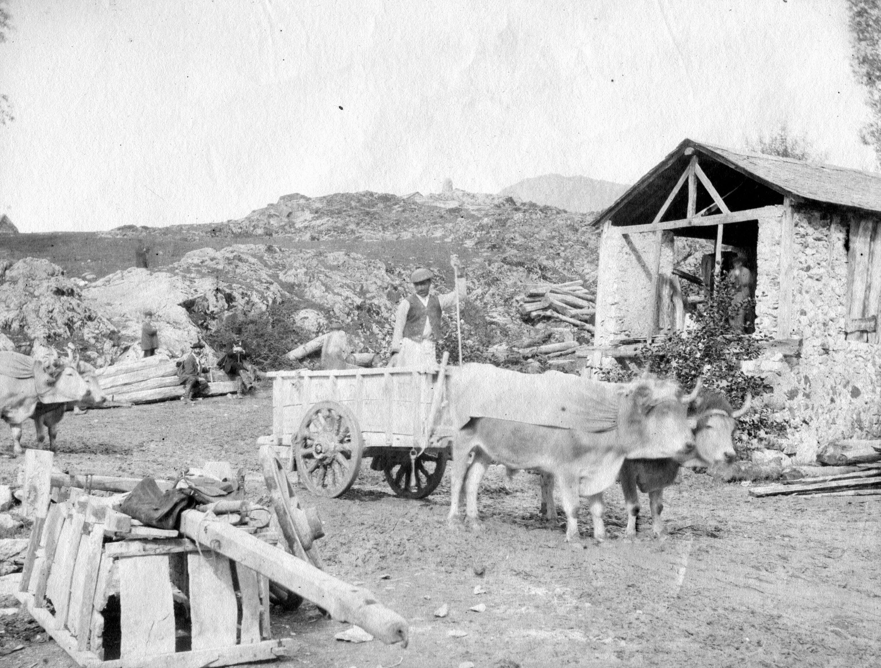 Fonds Trutat - Photographie ancienne Cote : TRU B 246 Localisation : Fonds ancien (S 30) Original non communicable Rôle de l’auteur : Photographe Lieu de création : Tarascon-sur-Ariège (Ariège ; canton) Date de création : 1882 Mesures : : 13 x 18 cm Observations : Notes manuscrites Trutat : "Hémisph[érique] rapide ; papier Morgan ; B 236". Mot(s)-clé(s) : -- Bâtiment -- Pierre -- Platrière -- Gypse -- Extraction -- Industrie du bâtiment -- Charpente -- Boeuf -- Charrette -- Homme -- Ouvrier -- Randonnée pédestre -- Costume masculin -- Enfant -- Roche -- Automne -- Congrès [Mention / citation] -- Tarascon-sur-Ariège (Ariège) -- Plâtrière -- Ariège (France ; haute vallée) -- 19e siècle, 4e quart Bibliothèque de Toulouse.